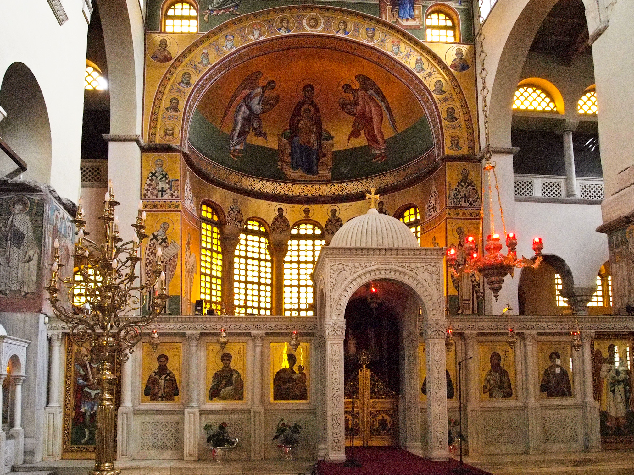 интерьер Базилики Св. Димитрия